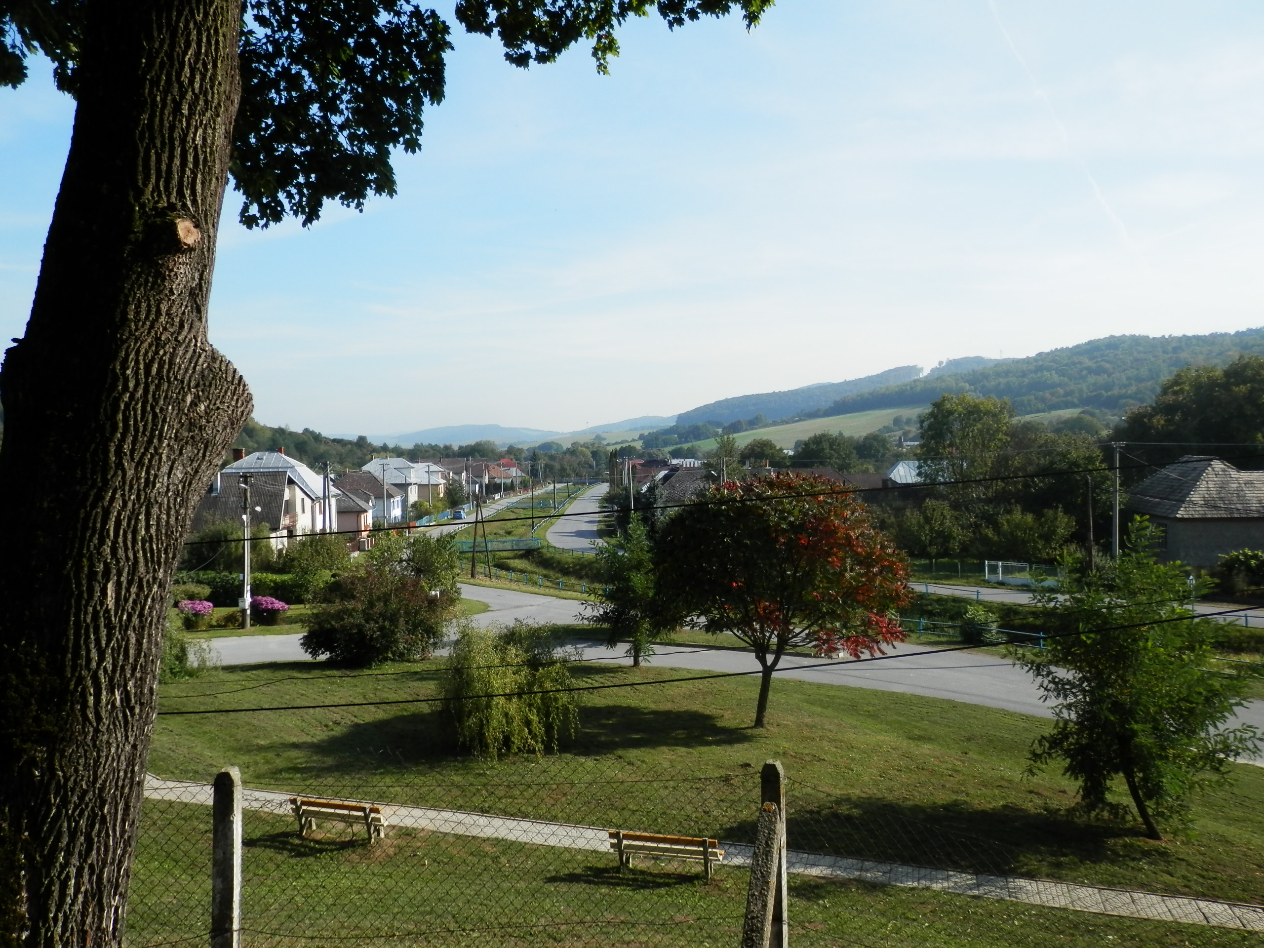 Obec Želmanovce, okres Svidník, Slovakia.